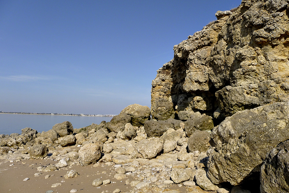 La pointe du Chay (vue nord) - Charente Maritime - France